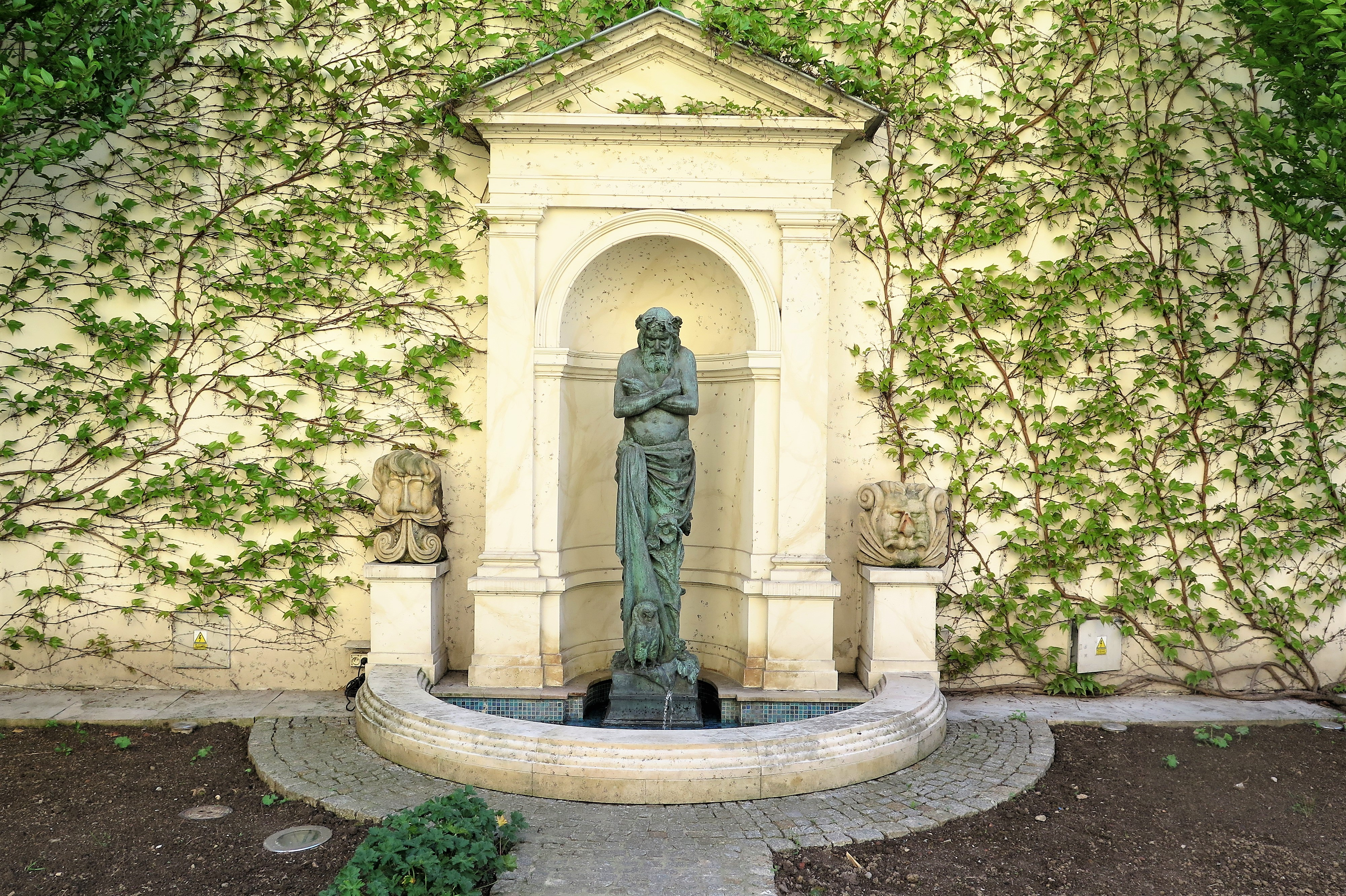 Teofila Certowicz "Morfeusz", Pałac Czapskich, Kraków.